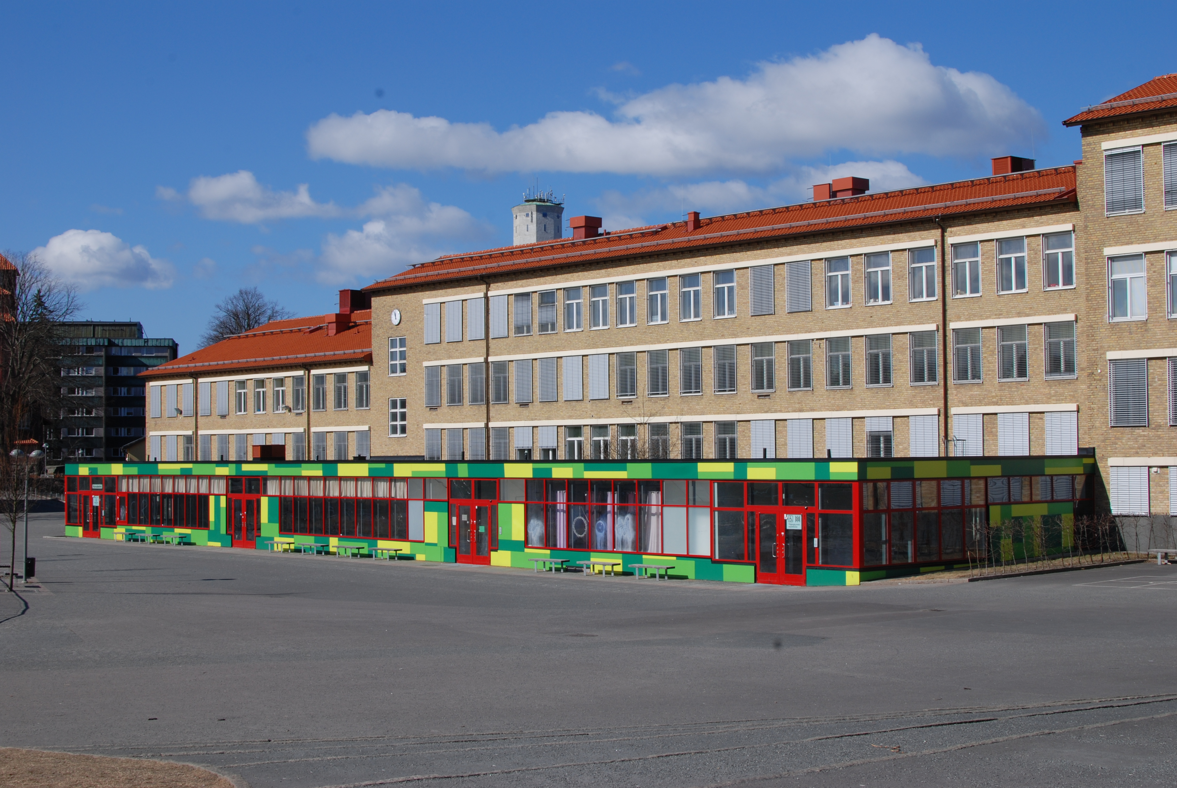 Nya Lundenskolan, Kärralundsgatan, i Göteborg. Byggnadsår 1946. Arkitekt Erik Holmdal